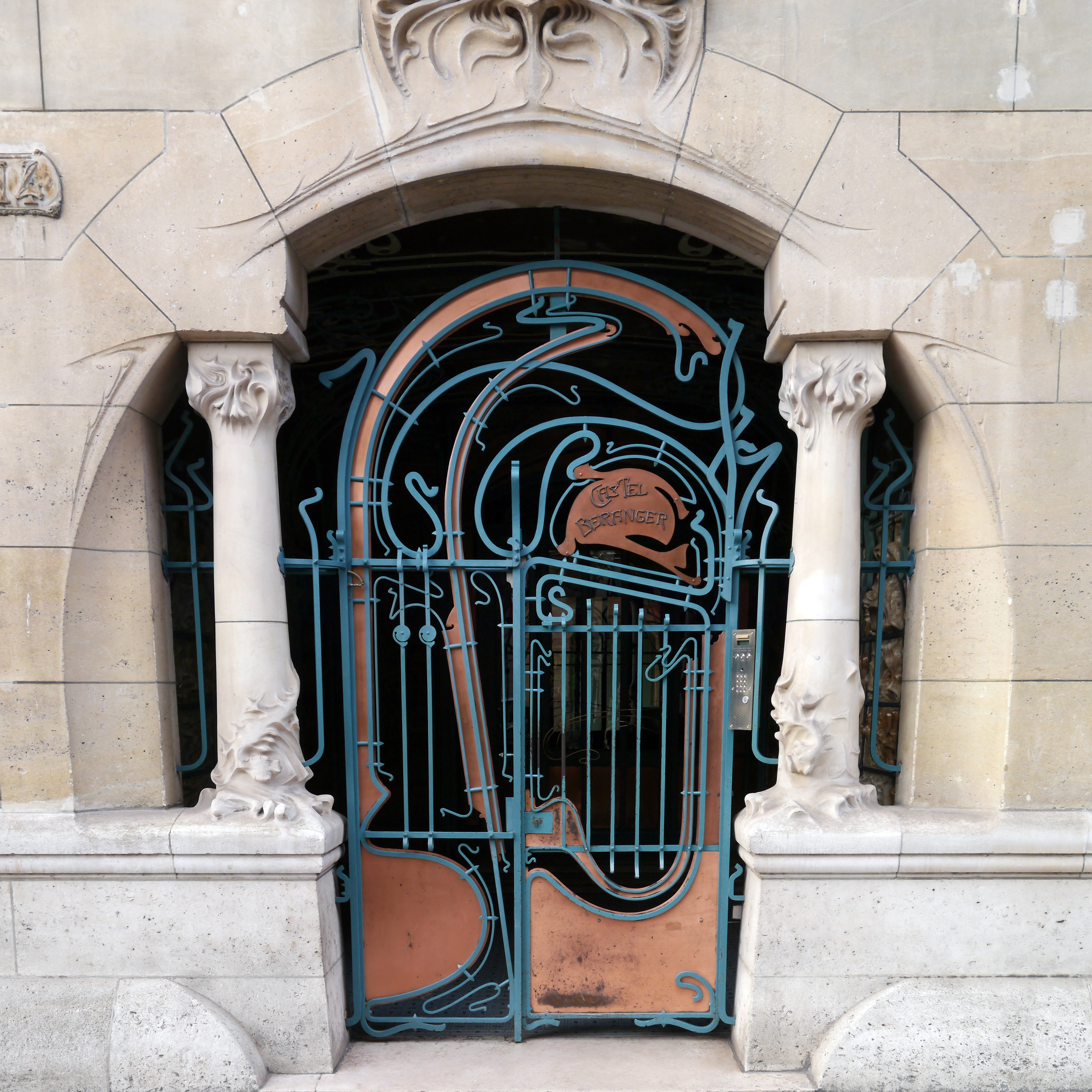 Porte d'entrée du Castel Béranger, grand œuvre art nouveau d'Hector Guimard (1898).